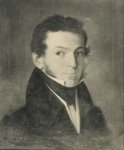 Andrej Smole